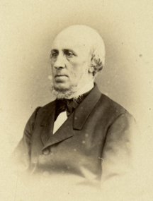 Retrato fotográfico esfumado de medio busto del político y escritor uruguayo Andres Lamas (1817-1891). Al dorso tiene una dedicatoria en en tinta ferrogálica "Al Sr. Dn. G. A. Posadas. Recuerdo de su amigo A. Lamas - Río de Janeiro. Agosto de 1866". Al pie del retrato puede leerse la firma de la empresa fotográfica "Carneiro & Gaspar. Phot." (Brasil). Dicha empresa estuvo conformada por los fotógrafos Joaquim Feliciano Alves Carneiro (s.f. - 1887) y Gaspar Antonio da Silva Guimarães (s.f. - 1874).